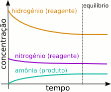 Gráfico da concentração das substâncias em um equilíbrio químico (desenhado por mim)